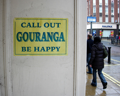 Gouranga Poster York